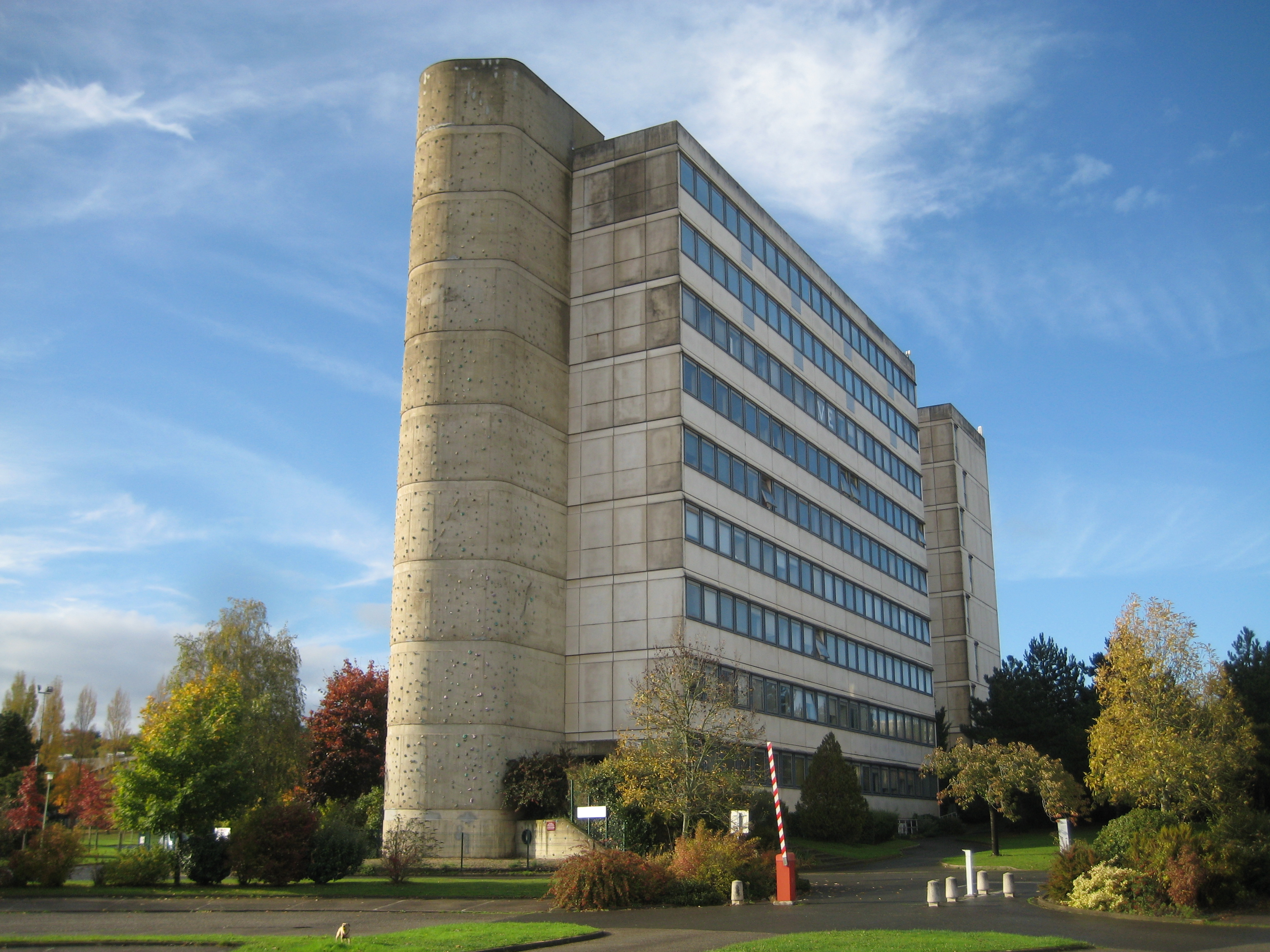 Batiment de recherche en mathématiques, physique, électronique, de l'université de Rennes 1, dits «Tour de maths»